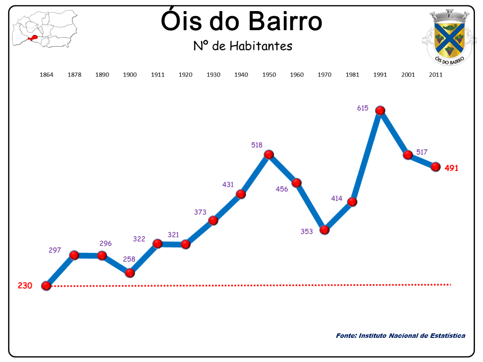 Freguesia